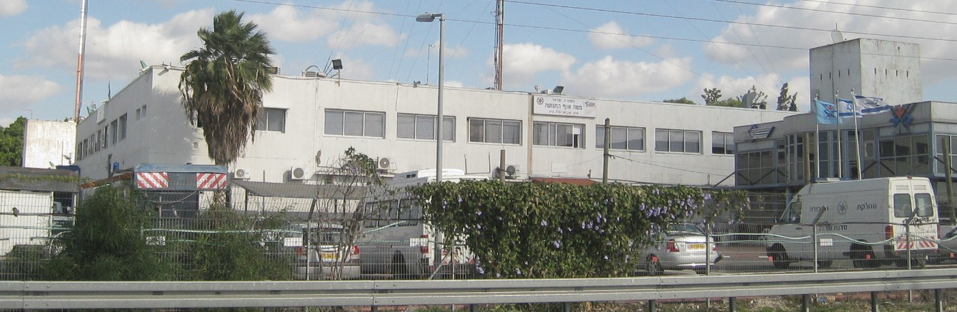 he:מצודת טיגארט בhe:בית דגן, 18 בנובמבר 2009